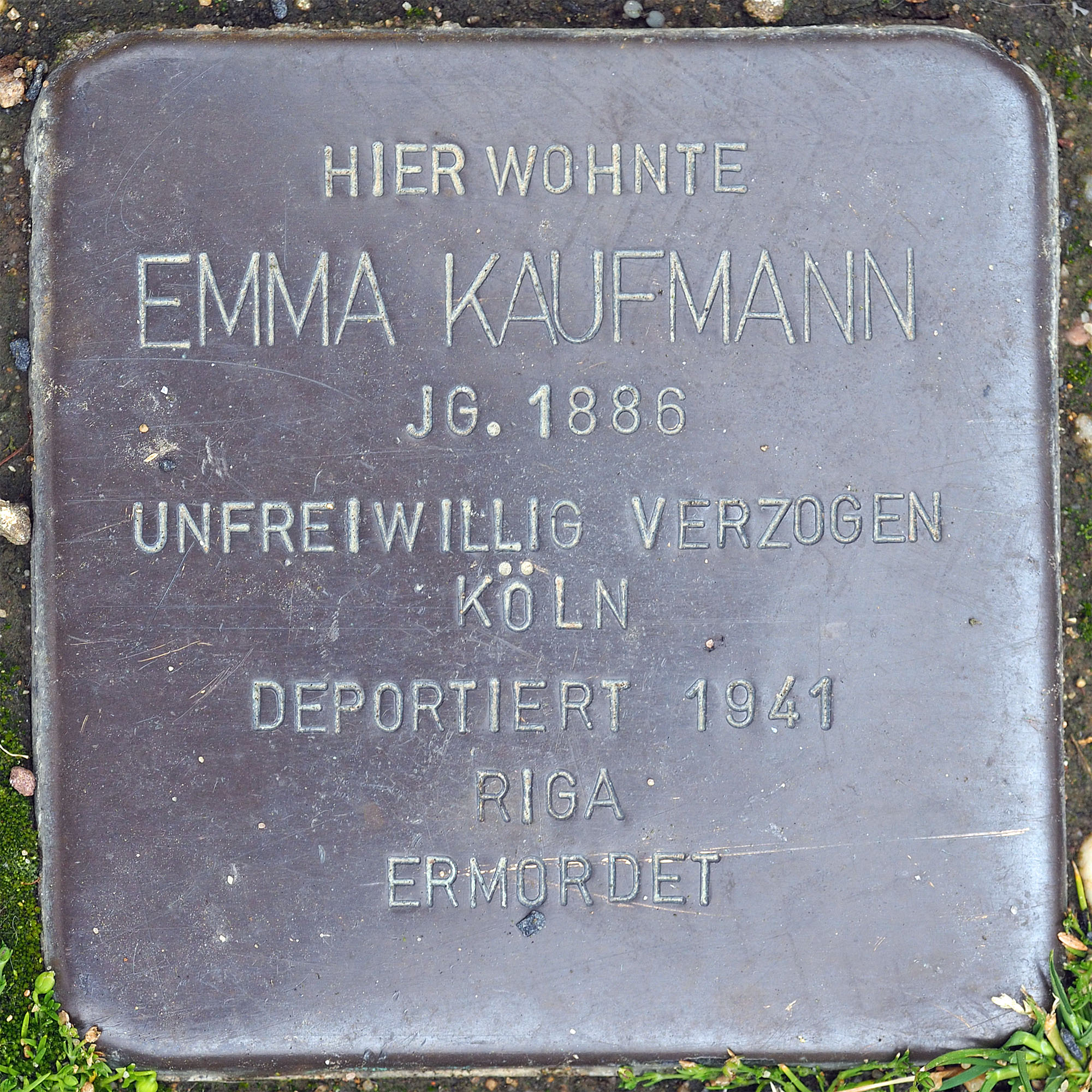 Stolpersteine GV: Kaufmann Emma